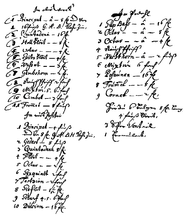 Autograph des Dispositionsentwurfs von Arp Schnitger für Hamburg (St. Johannis), jetzt in Cappel